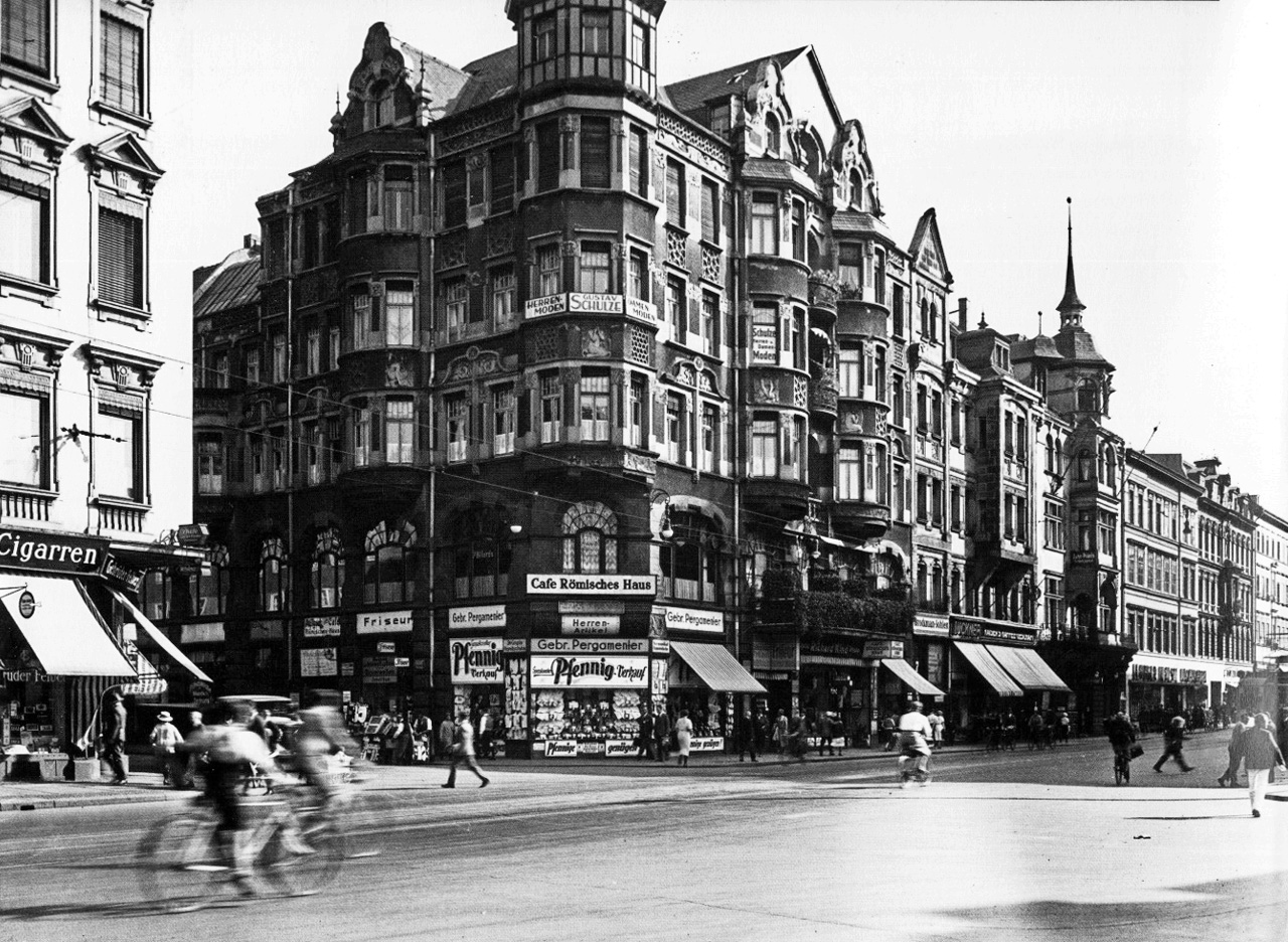 Das Cafe Römisches Haus Peterssteinweg / Härtelstraße Leipzig, um 1928.